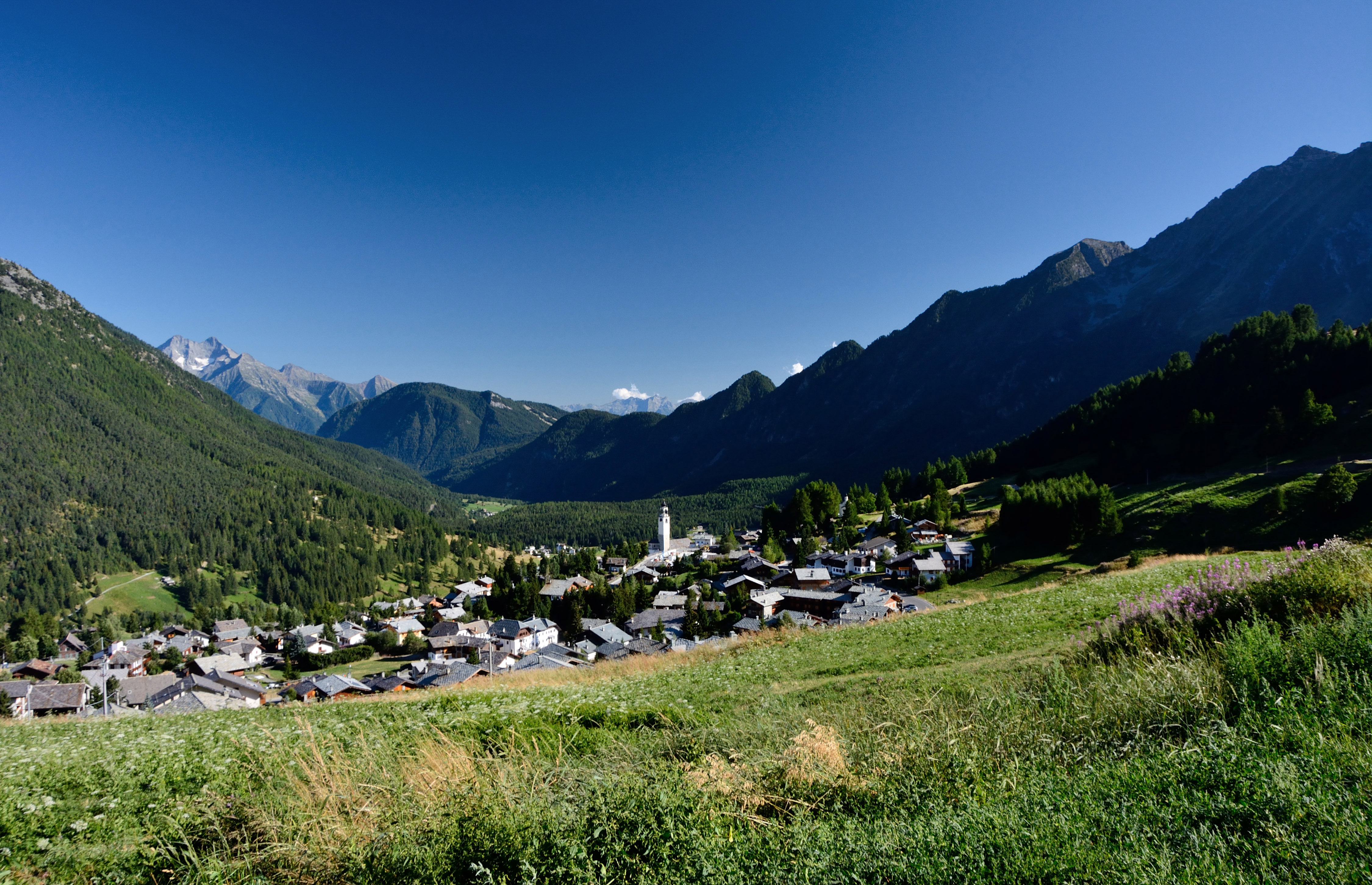 Antagnod visto dalla strada che conduce in località Barmasc.